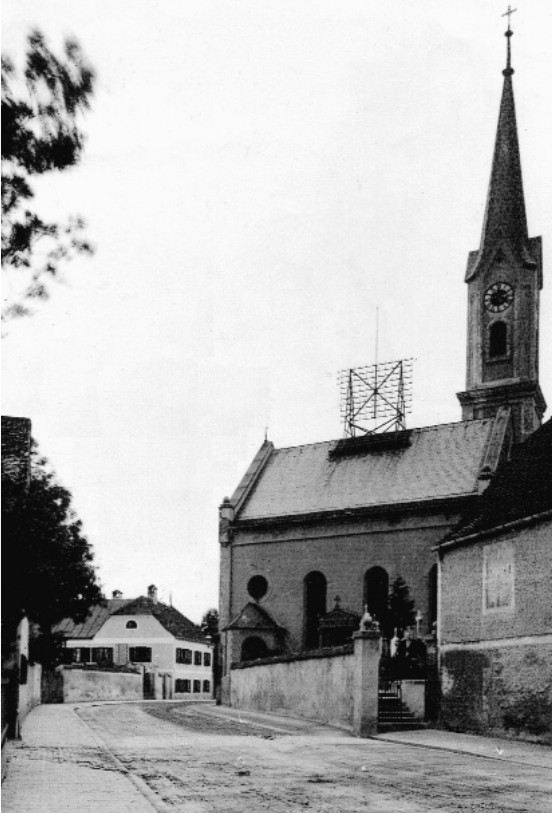 Die Zimmergörglsölde (Winthirstraße 18) und die Winthirkirche (Winthirstraße 15) in Neuhausen im Jahr 1905